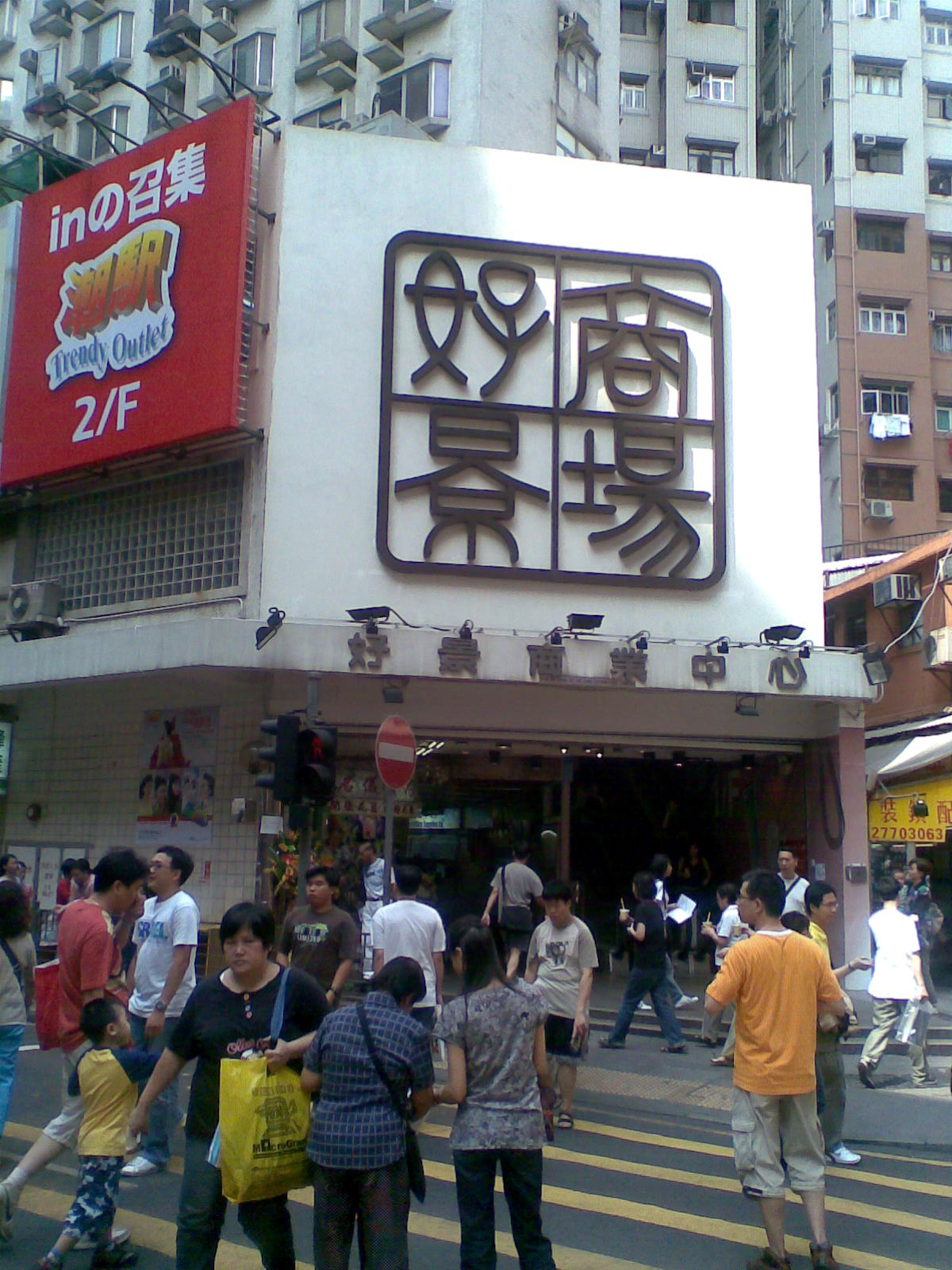 好景商場